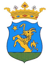 Blason de la famille Thaon de Revel